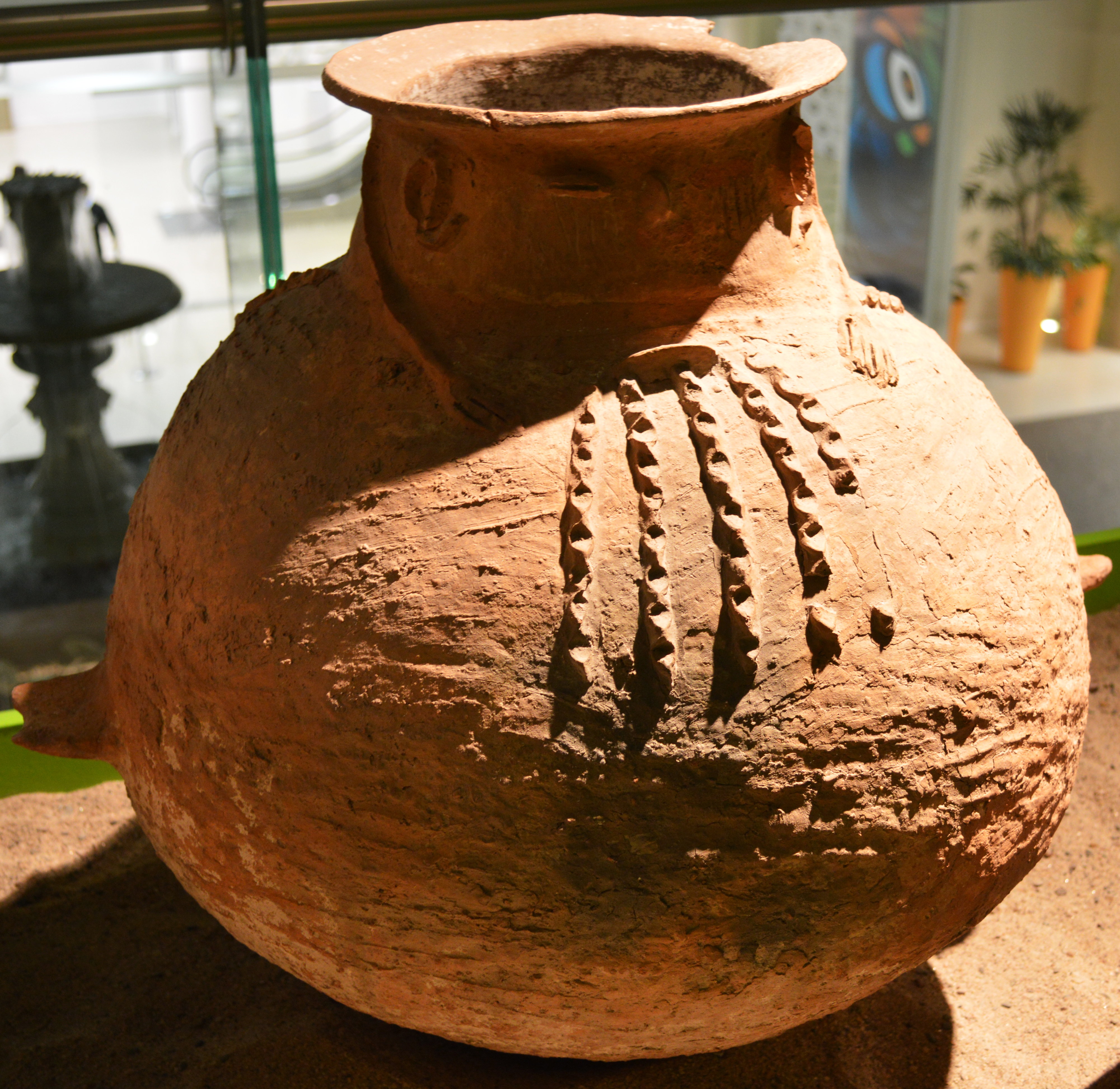 Museo Histórico Di Lullo